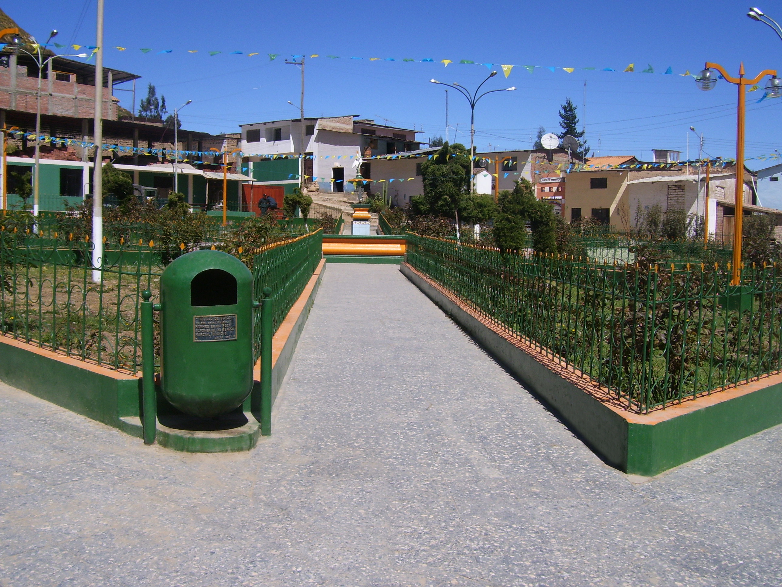 Plaza de Armas de Ocros.